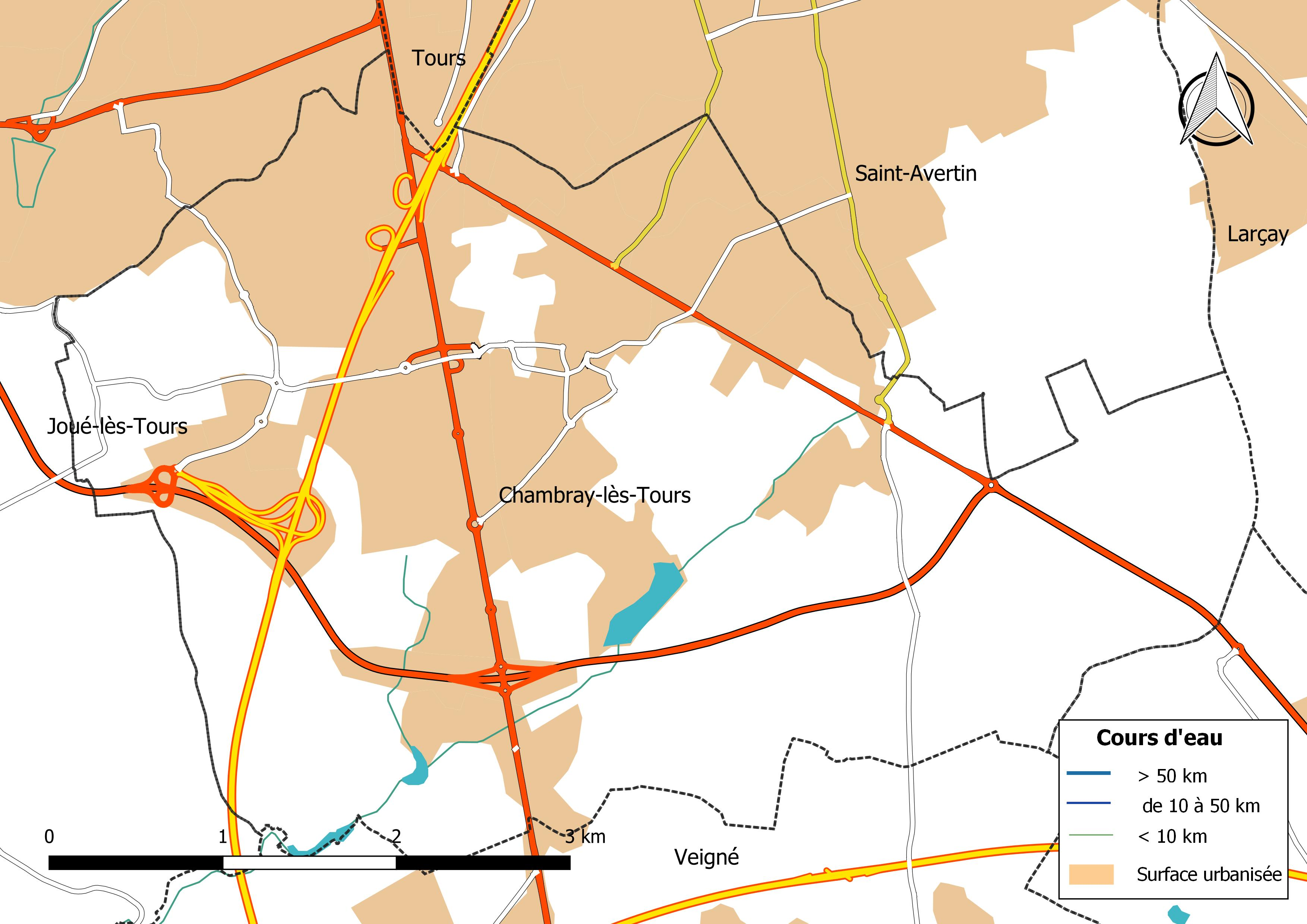 Carte du réseau hydrographique de la commune de Chambray-lès-Tours (France).